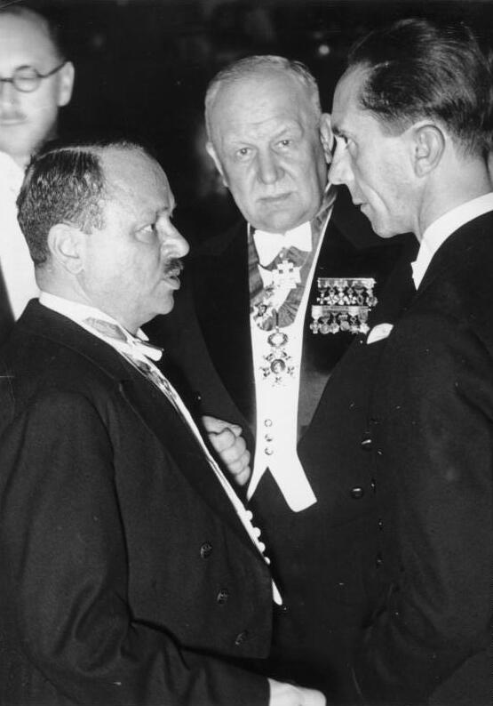 Empfang des 9. Internationalen Komponisten- und Autorenkongresses durch Dr. Goebbels im Kaiserhof. Das Bild zeigt von links den Österreicher Bernhard Herzmansky junior (1888–1954), Franz Lehár und Dr. Goebbels. Aufn.: Wagner 14152-36